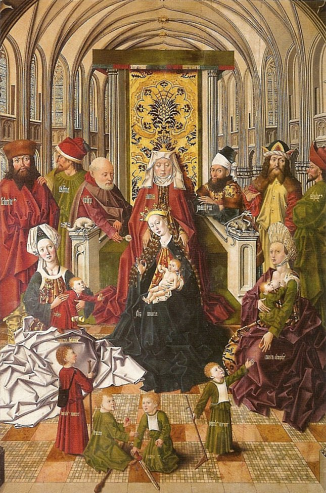 Sainte Parenté, dans la Wiesenkirche de Soest. Maître de 1473